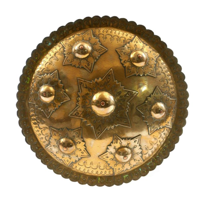 Schild. Klein rond schild van messing versierd met stervormige knoppen Unknown language: Peurise teumaga